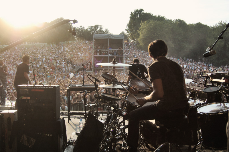 Editors на фестивале «Пикник «Афиши», Москва, 2010